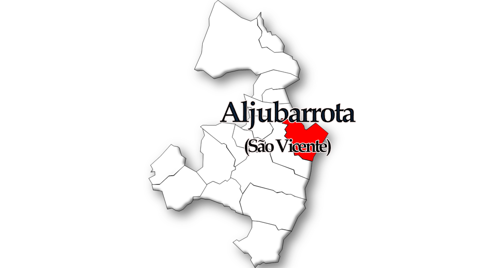 População